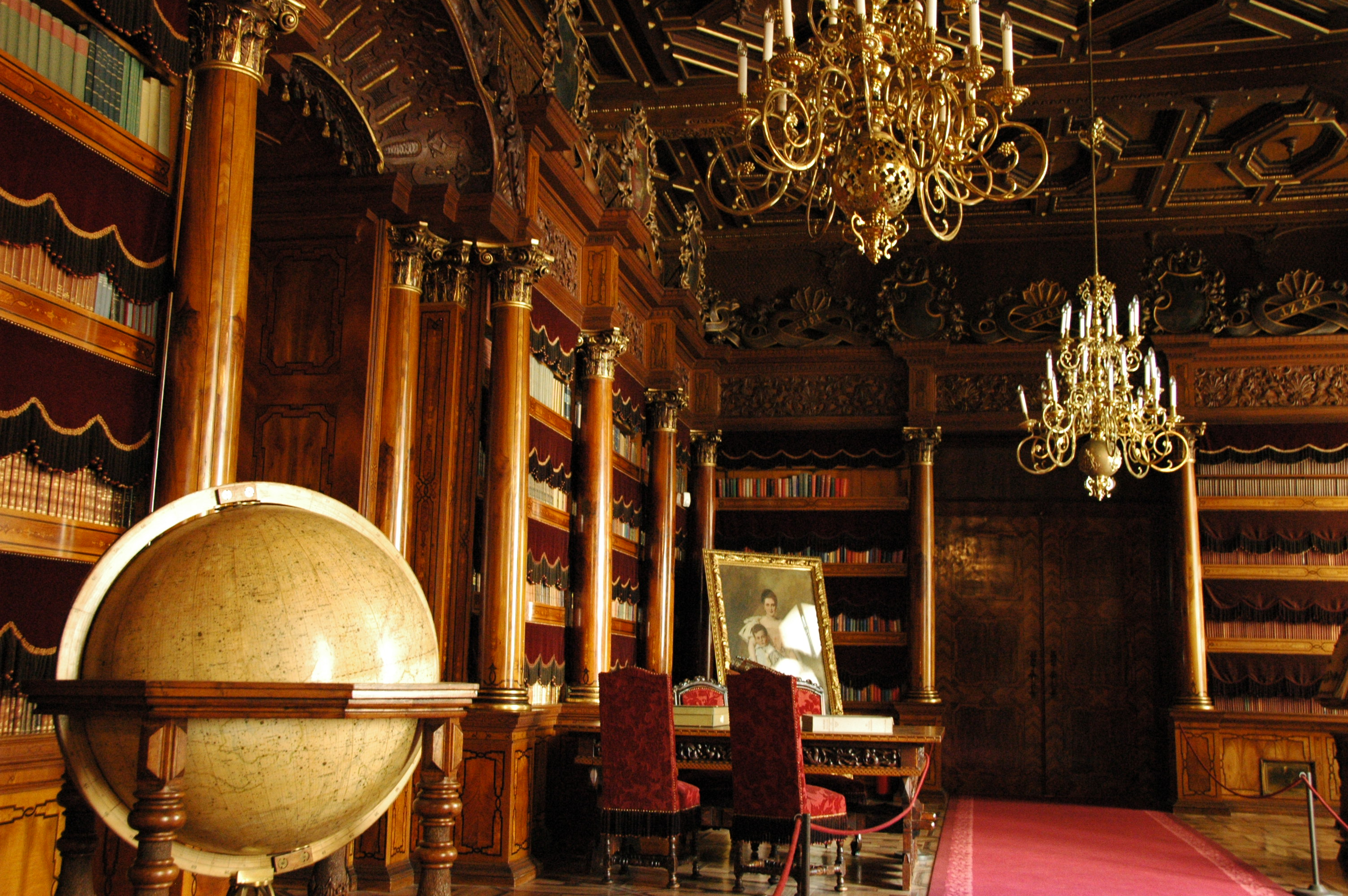 Hluboká, bibliotheek kasteel Categorie:Wikipedia:Afbeeldingen/Gebruiker:P.H. Louw